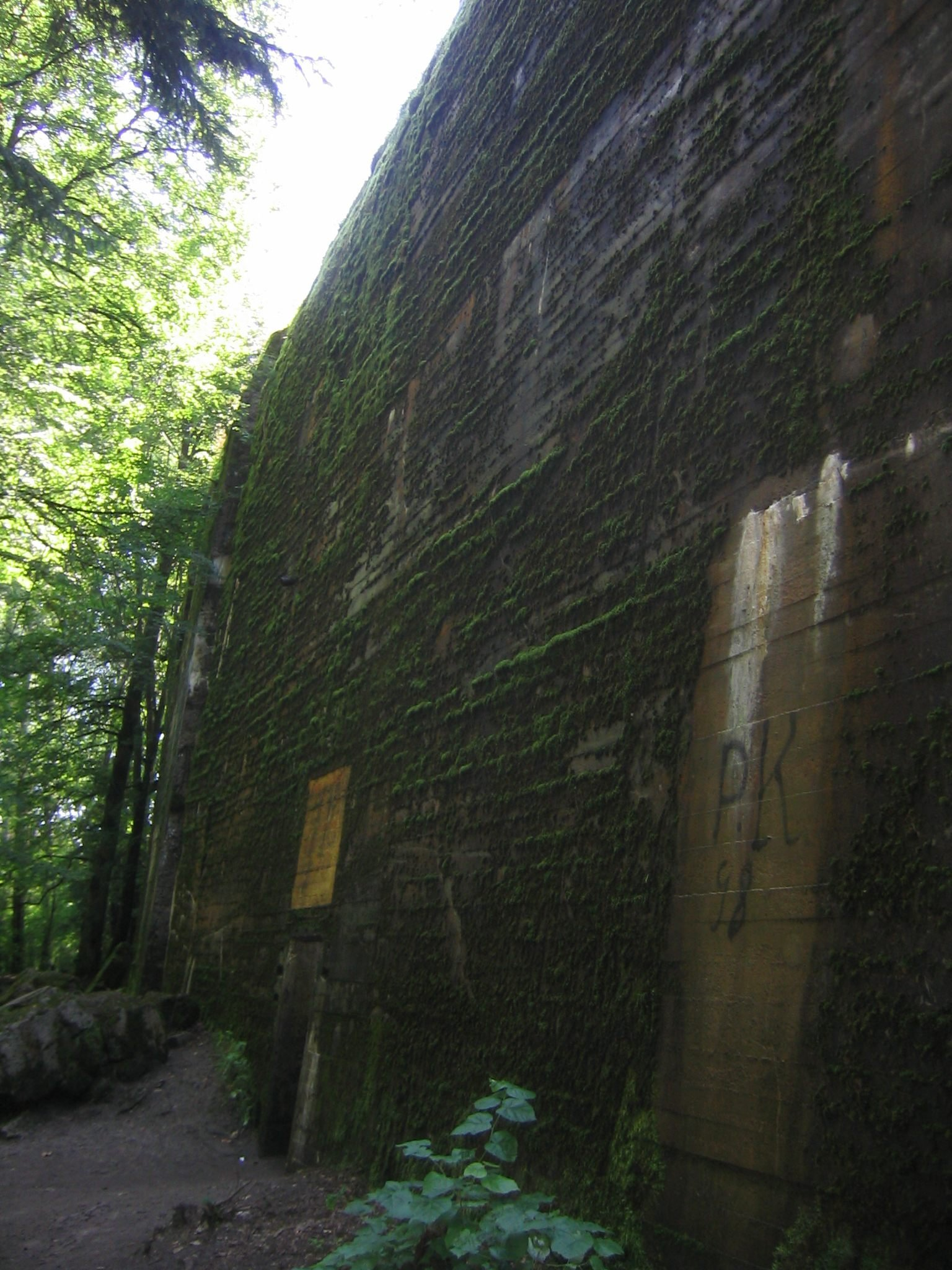 Ruine von Hitlers Bunker in der Wolfsschanze.